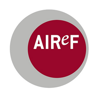 Logotipo de la Autoridad Independiente de Responsabilidad Fiscal española (AIReF), organismo oficial creado en 2014.